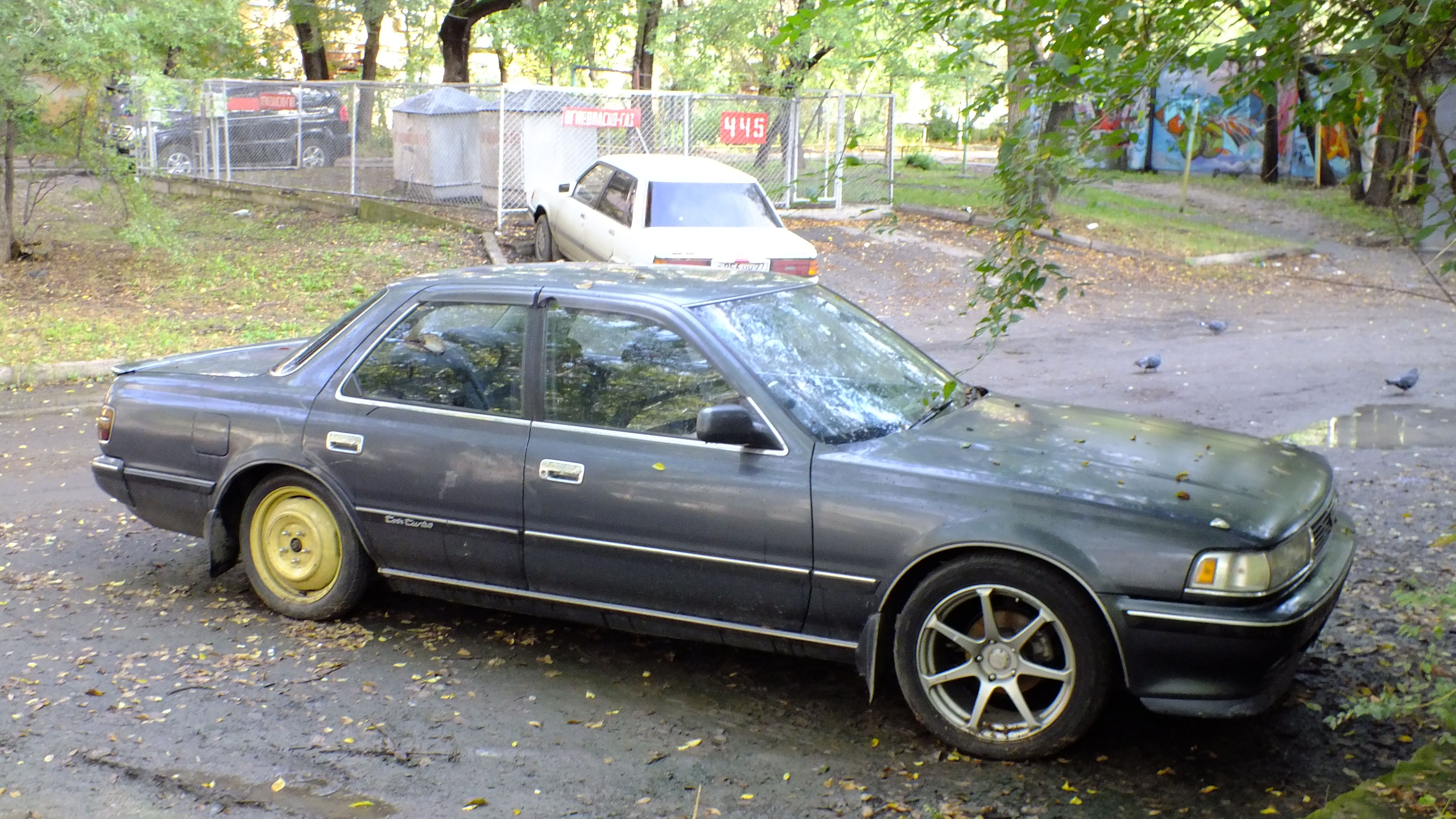 Желтое запасное колесо на японском автомобиле